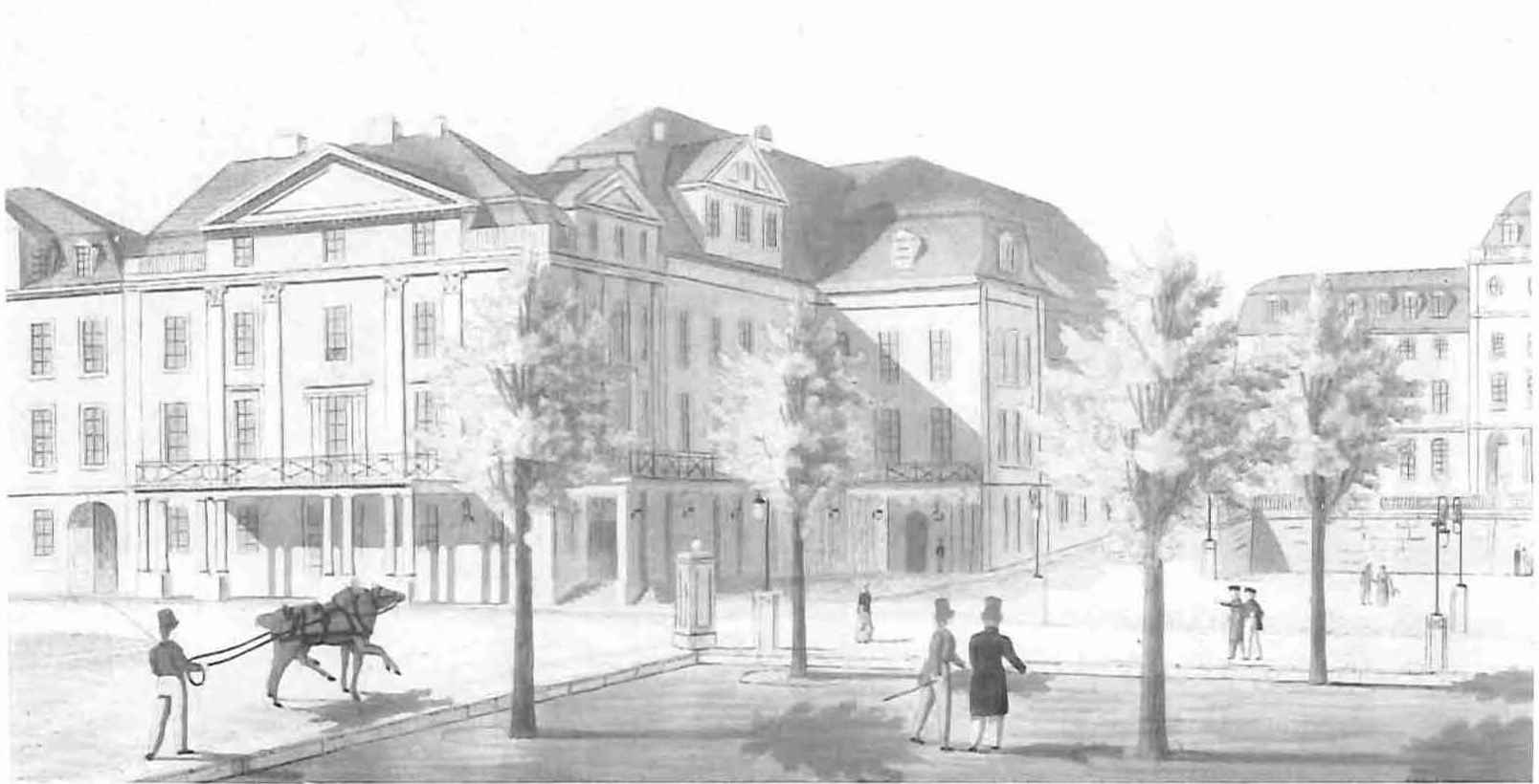 Das alte Opernhaus in Kassel - nach einem kolorierten Stich um 1850